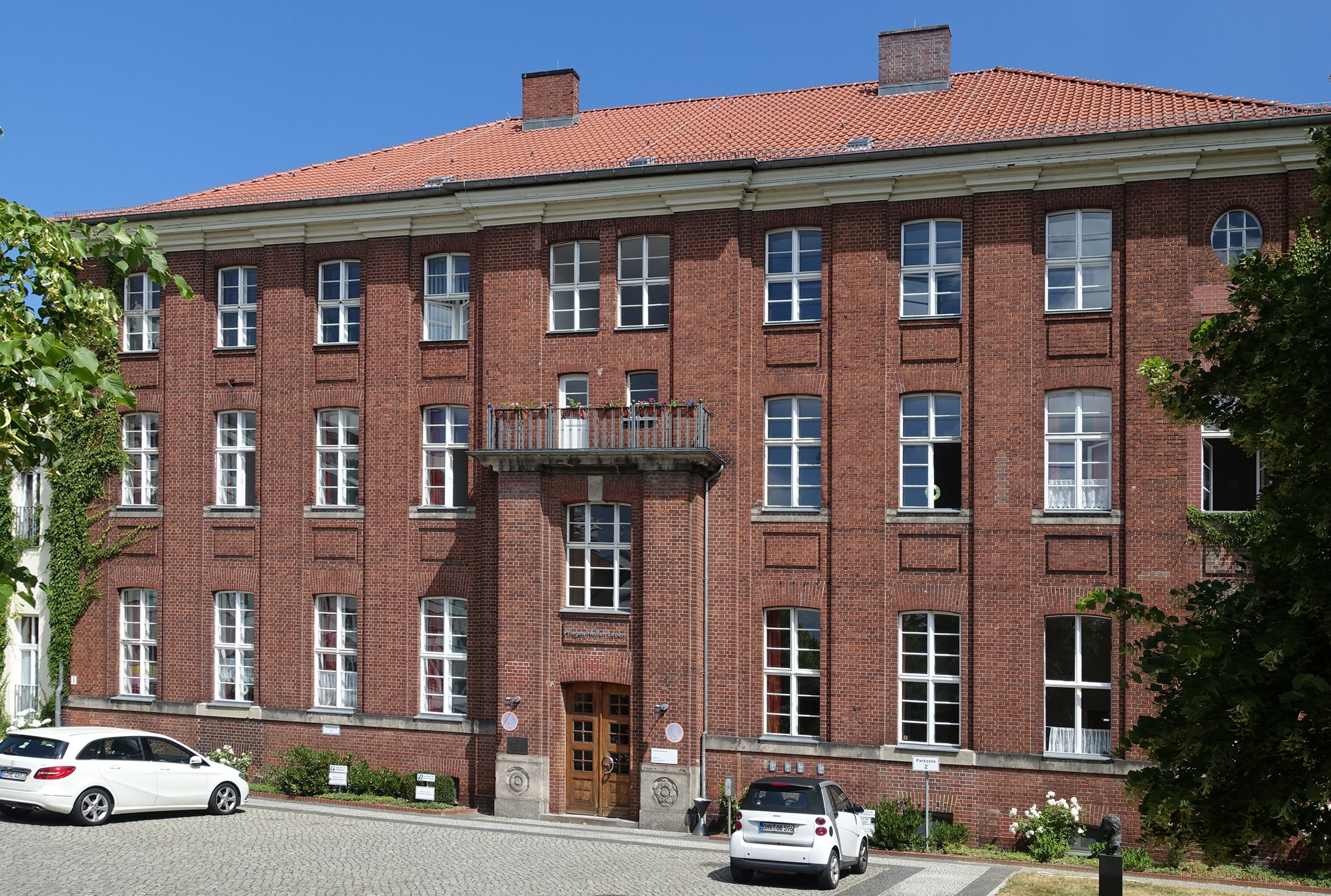 Krankenhausgebäude